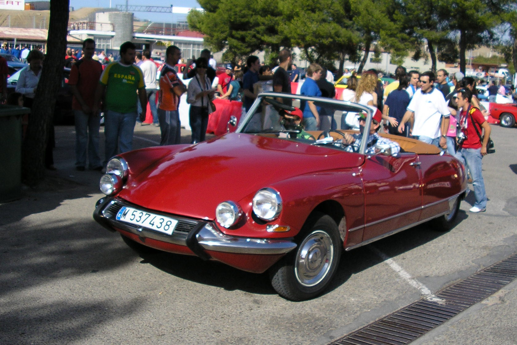 Citroën DS Cabrio shown in Circuito del Jarama (Madrid). Jornada de puertas abiertas 2006.